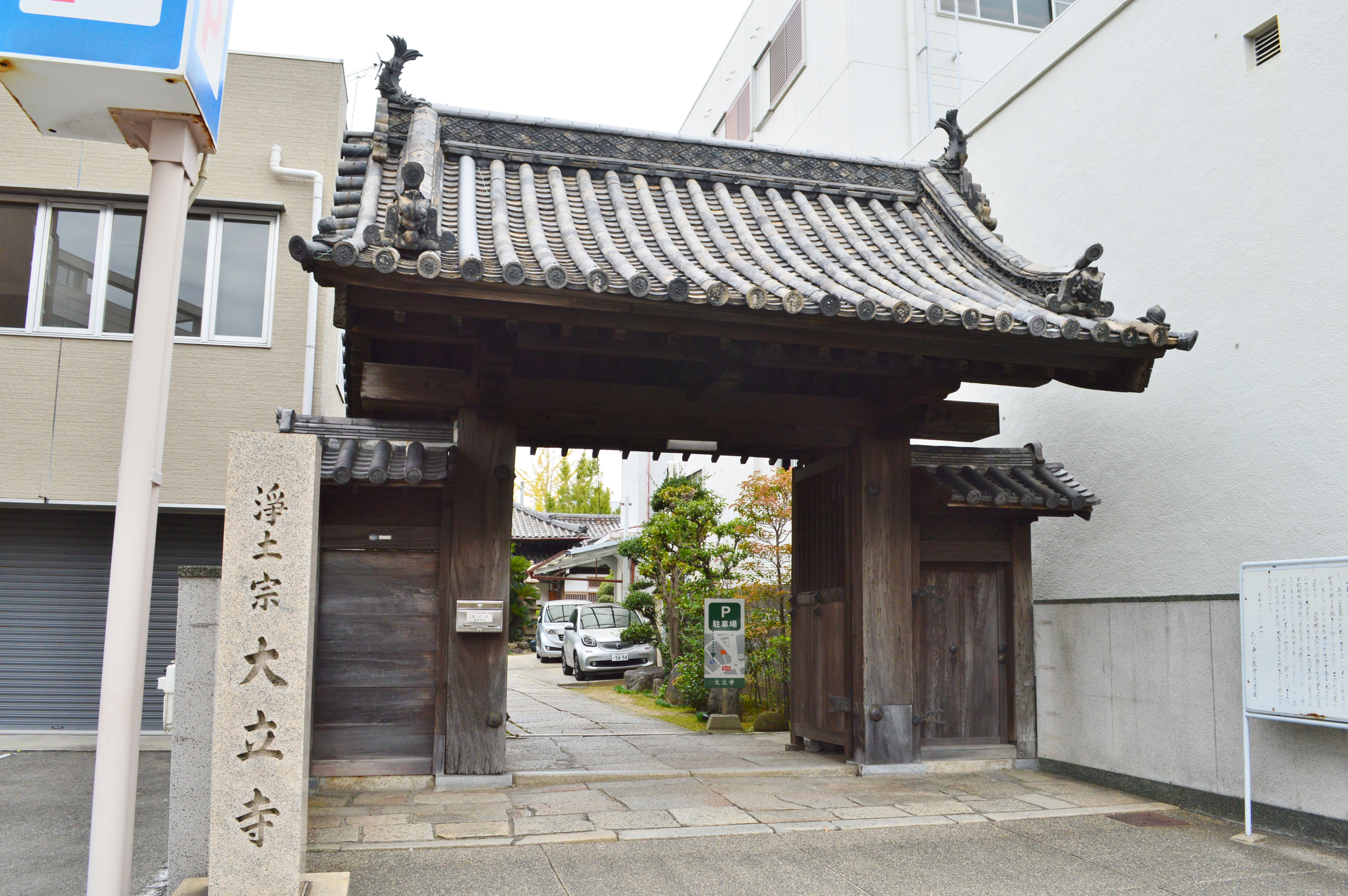 大立寺 (和歌山市) 山門 (伝紀伊太田城大門)